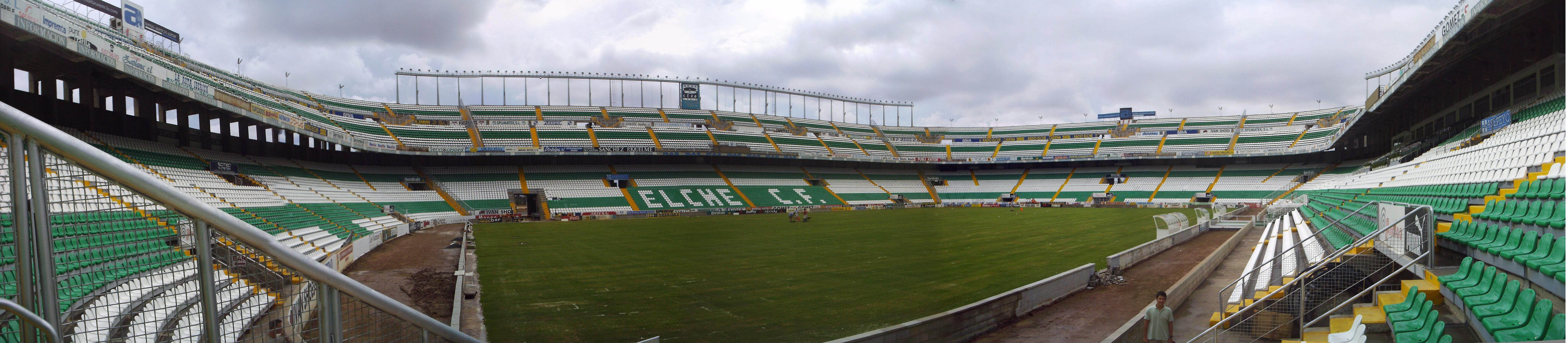 Estadio Martínez Valero en Elche (Alicante)